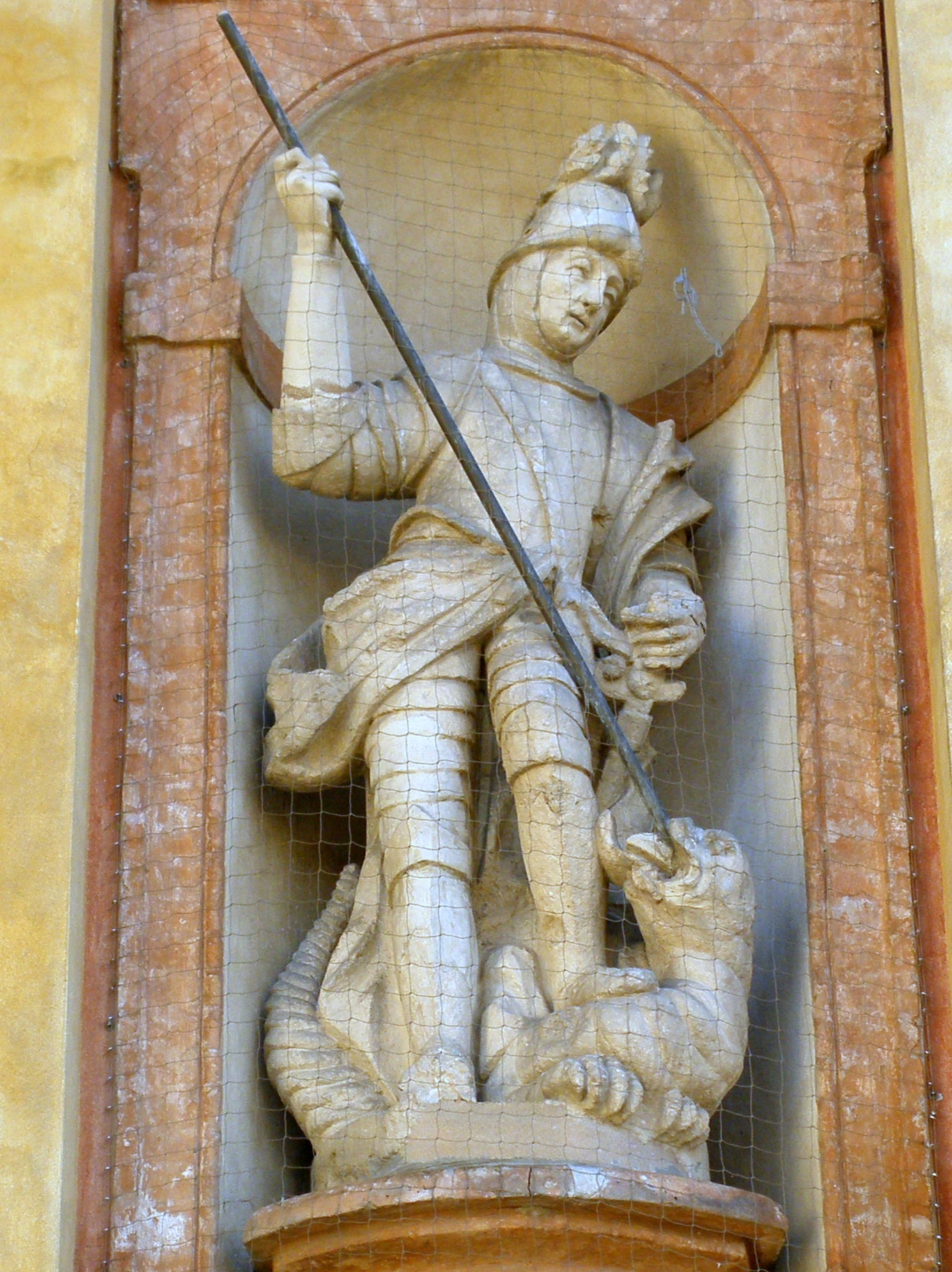 Occhiobello, Chiesa Arcipretale di San Lorenzo, Diacono e Martire: la statua di San Giorgio e il drago, opera di Pietro Turchi, che adorna la parte sinistra della facciata barocca della chiesa.